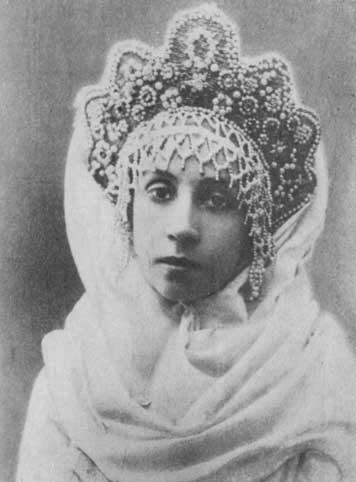 Русская актриса Надежда Фёдоровна Скарская в роли Катерины в пьесе «Грозе» А.Н. Островского, Елизаветград (1902 г.)